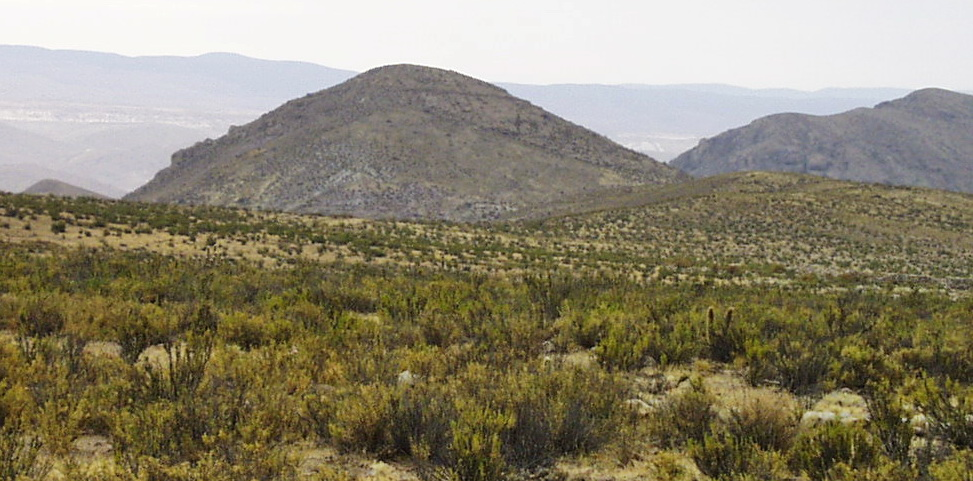 Pucará de Saxamar This is a photo of a national monument in Chile: 1282